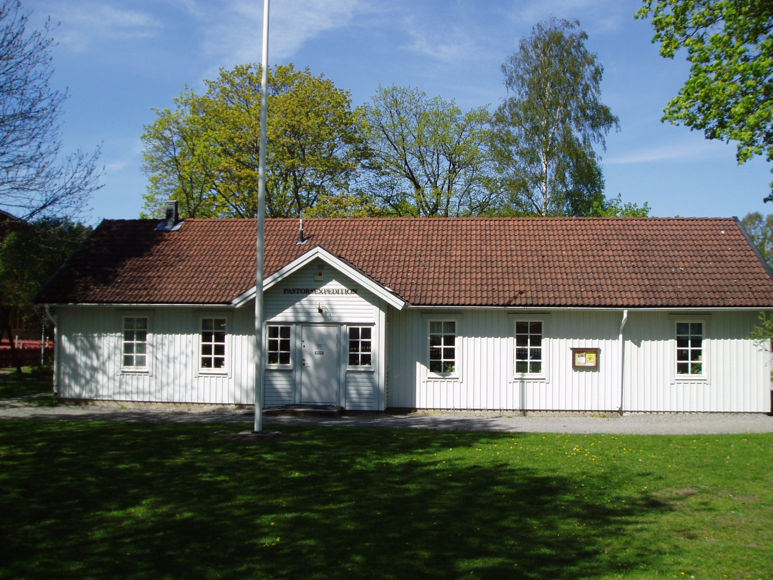 Pastorsexpeditionen, Djurö, Värmdö kommun, Sweden